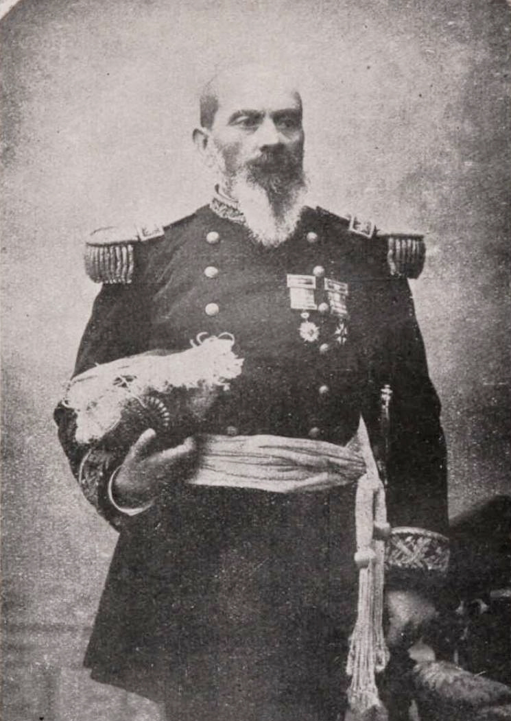 Orozimbo Barbosa (1838 - 1891)